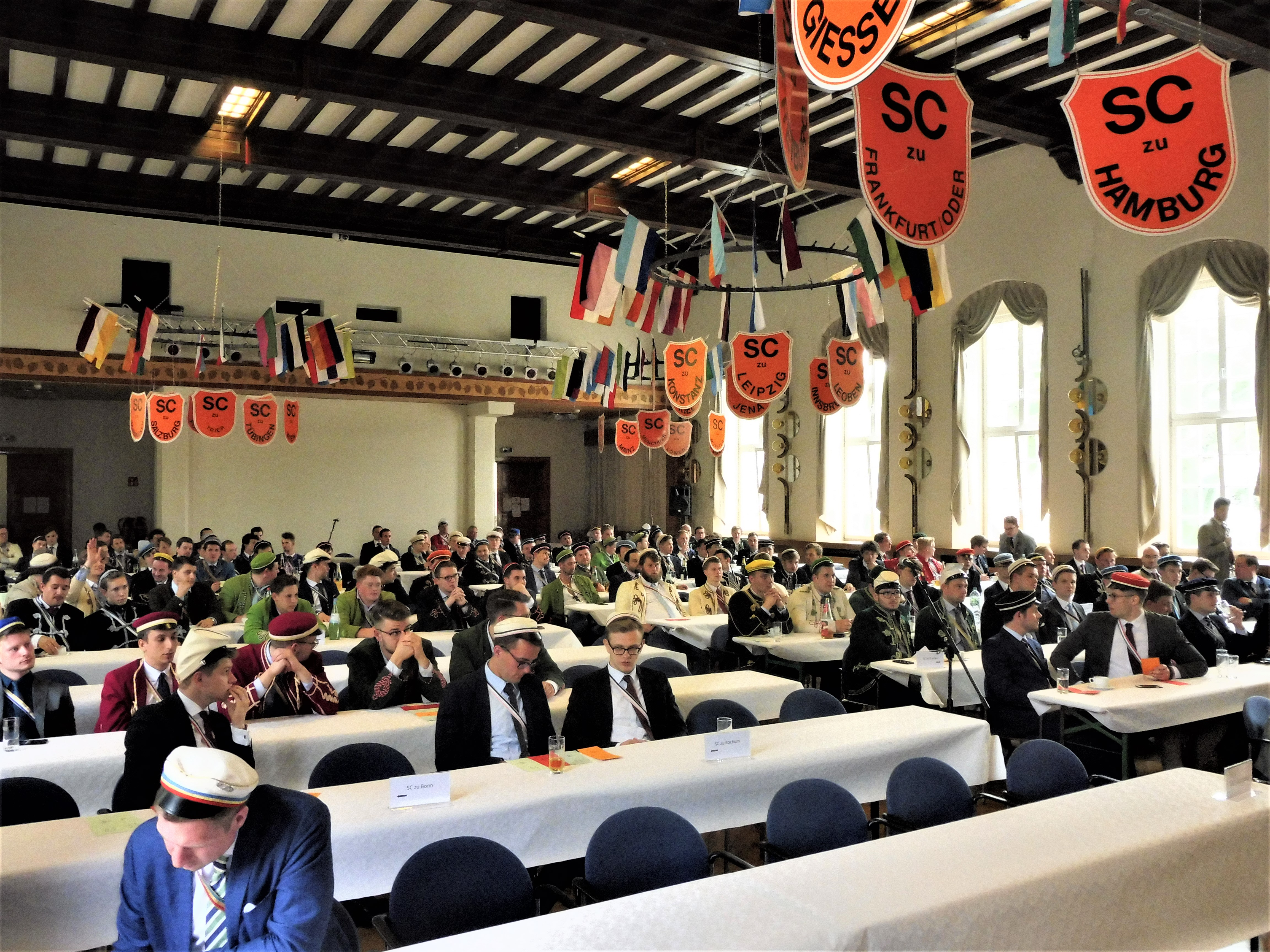 Schilde der Senioren-Convente beim Kösener Congress im Mutigen Ritter, Bad Kösen